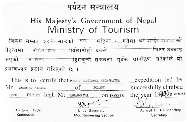 Potwierdzenie zdobycia Mount Everestu przez wyprawę zimową 1980 wydane przez władze Nepalu